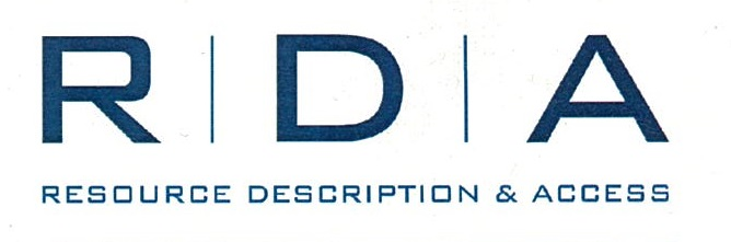 logo de les normes RDA